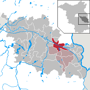 Müllrose in Brandenburg (Country) - District Oder-Spree